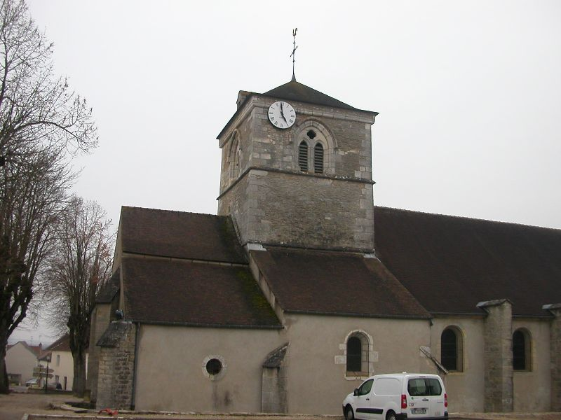 église de MESSIGNY ET VANTOUX (21)